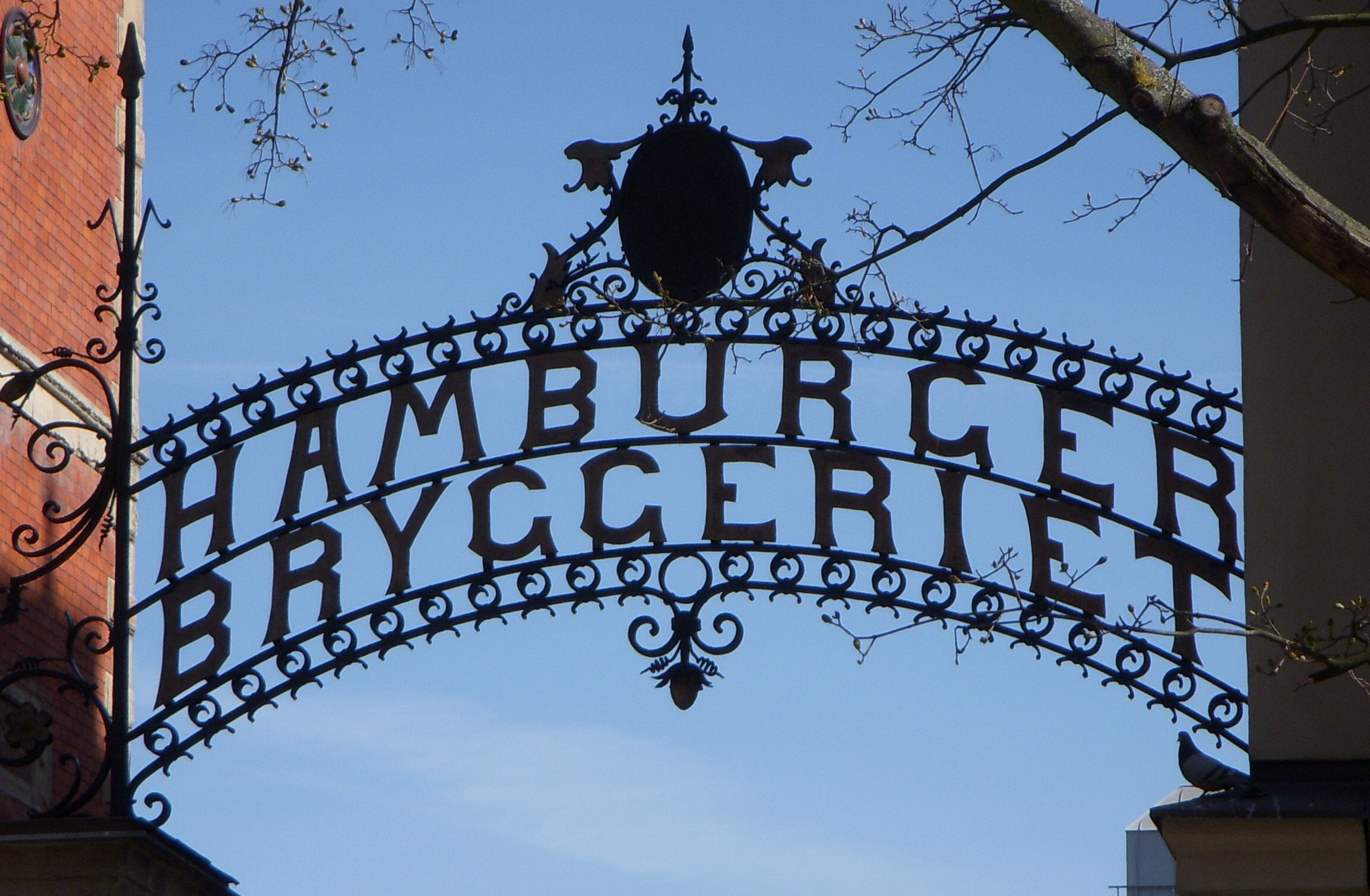 Hamburgerbryggeriet vid Surbrunnsgatan i Stockholm, skylt